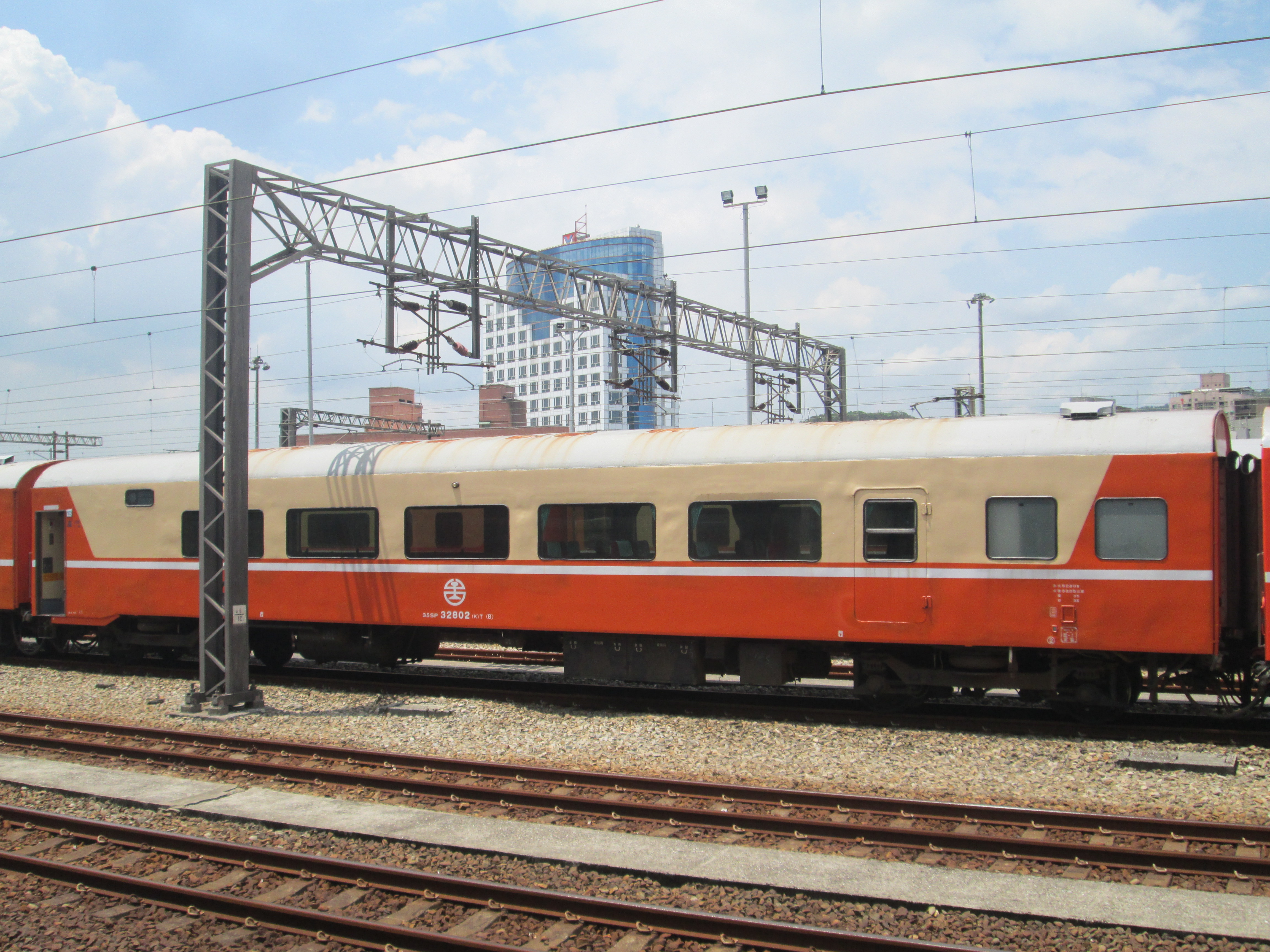 臺灣鐵路管理局莒光號客車35SP32802(K)T(B)停靠七堵調車場。